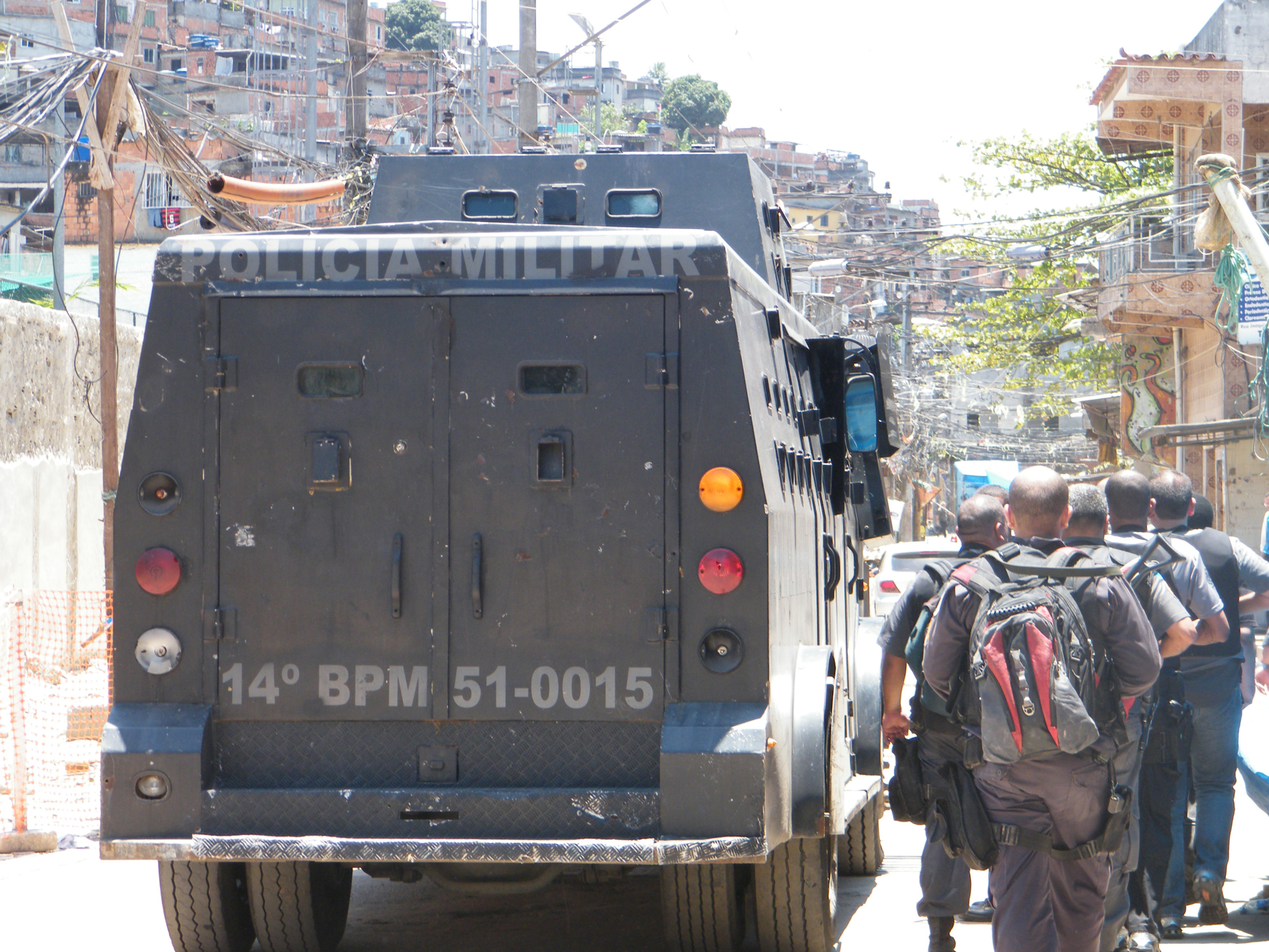 Rio de Janeiro - Forças de segurança ocupam o Complexo do Alemão depois de ter sido oferecida a possibilidade de rendição aos traficantes. A ação das policiais, com o apoio das Forças Armadas, inclui o uso de tanques militares, helicópteros e outros veículos. A bandeira do Brasil foi hasteada na parte mais alta do morro como marca da ocupação policial. Armas, munição e droga foram apreendidas em vários locais ( Agência Brasil -ABr)